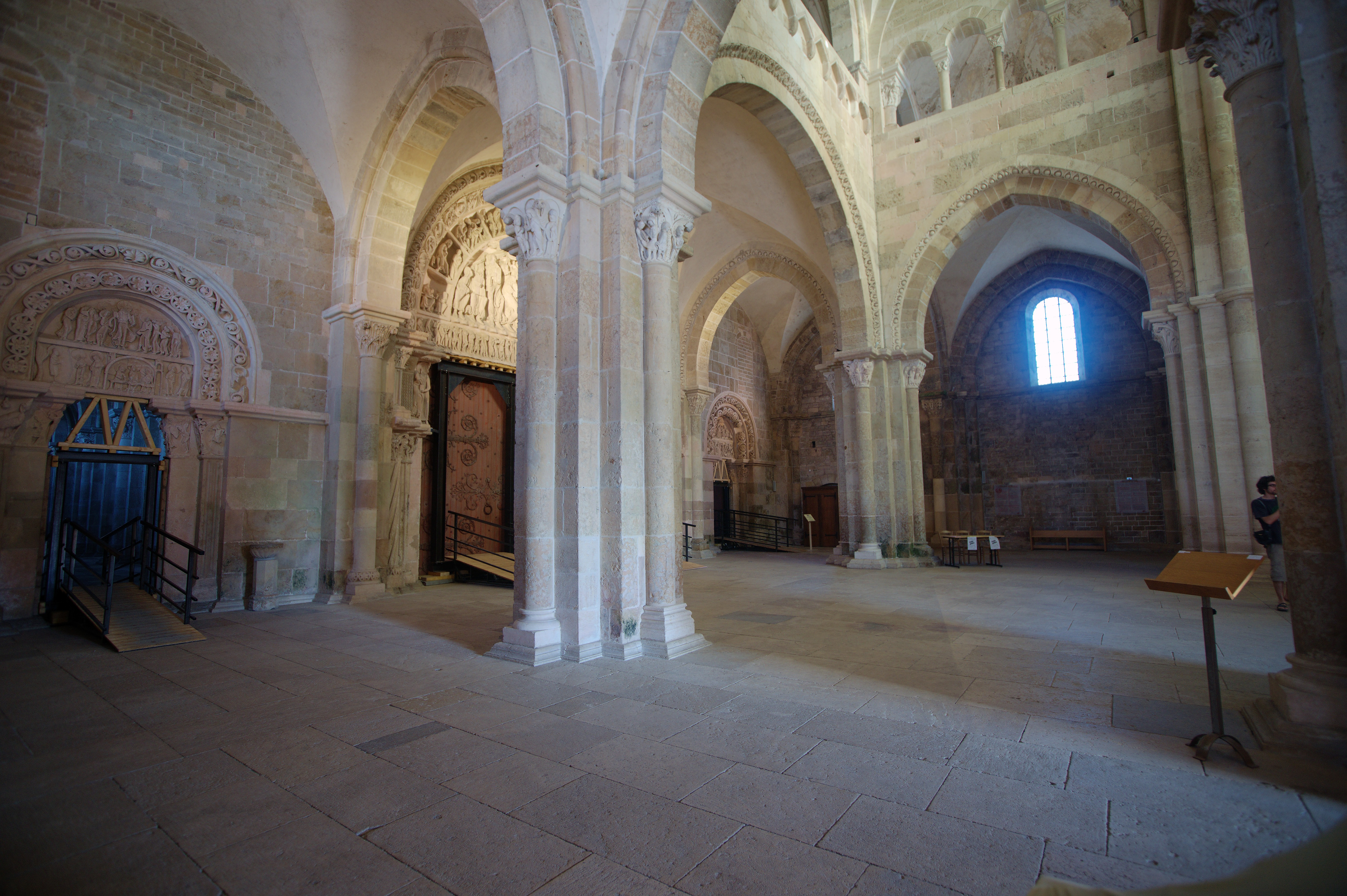 vue du narthex .